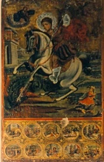 Άγιος Γεώργιος δρακοντοκτόνος, 19ος αι., Ανάληψη, Θεσσαλονίκη